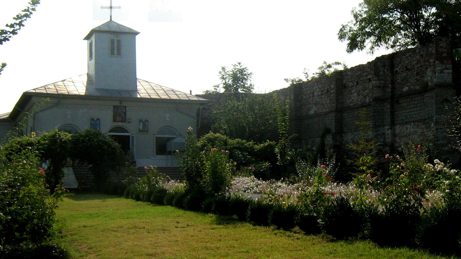 Biserica ortodoxă "Sf. Gheorghe"